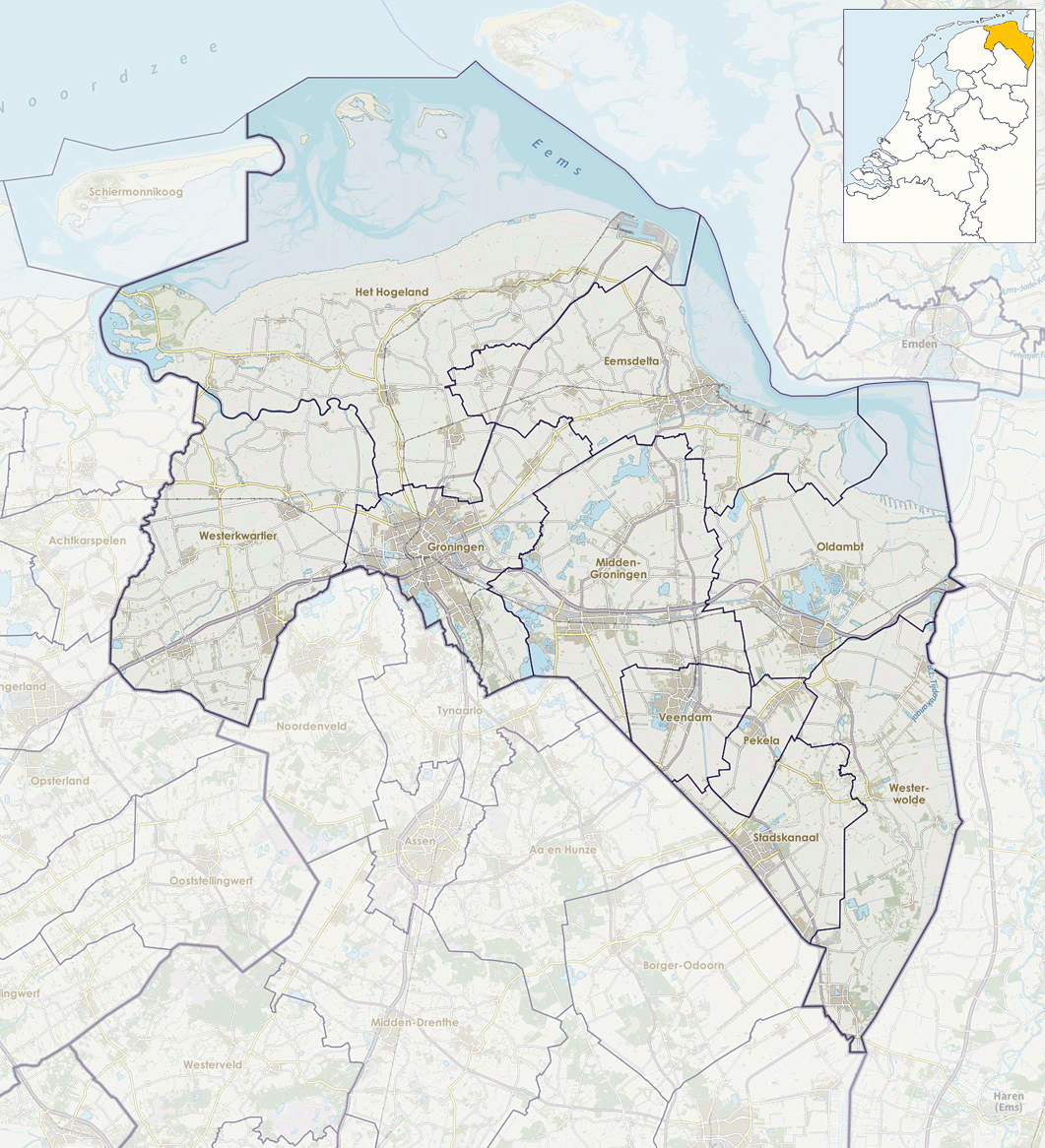 Positiekaartje van de provincie, variant "gemeentelabels"